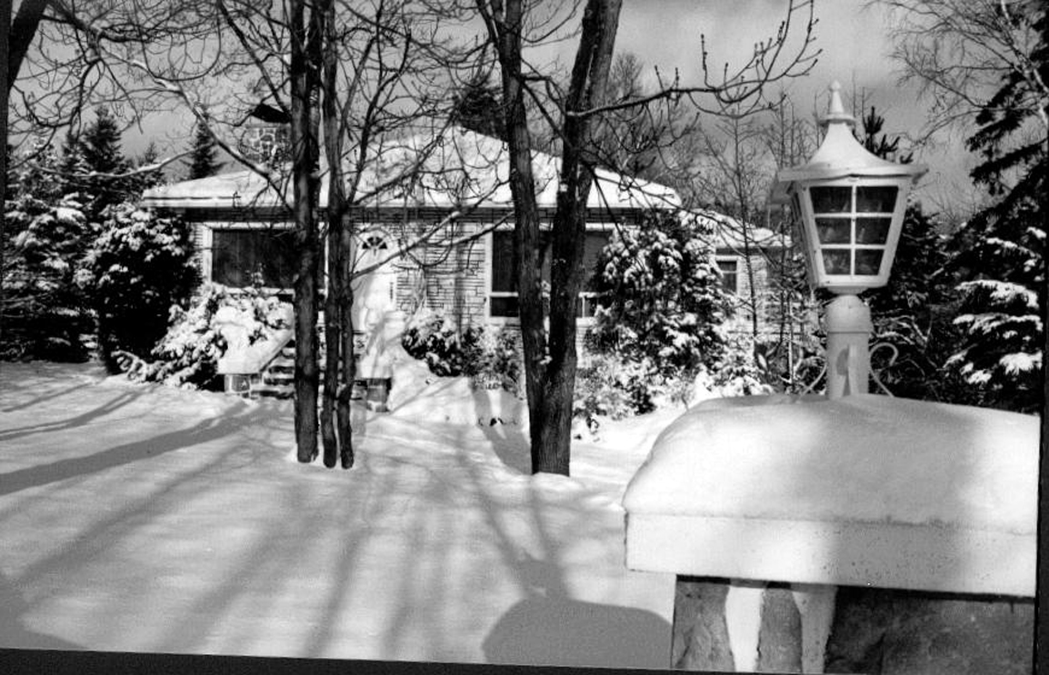 Photo prise lors de la construction de la Maison de réhabilitation pour femmes, à Val-David, Québec, Auberge du Nouveau-chemin